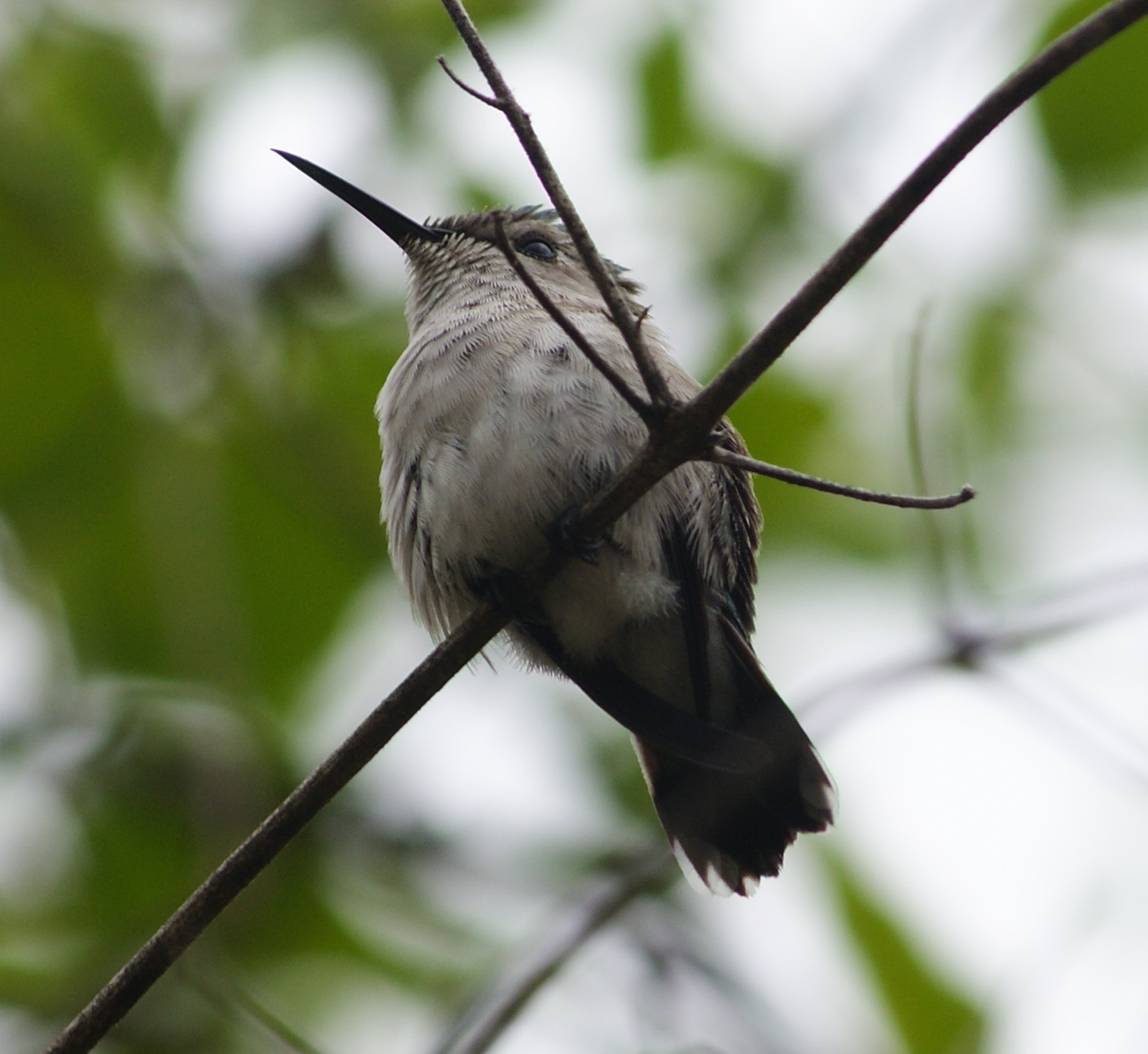 Bienenelfe bei Playa Girón